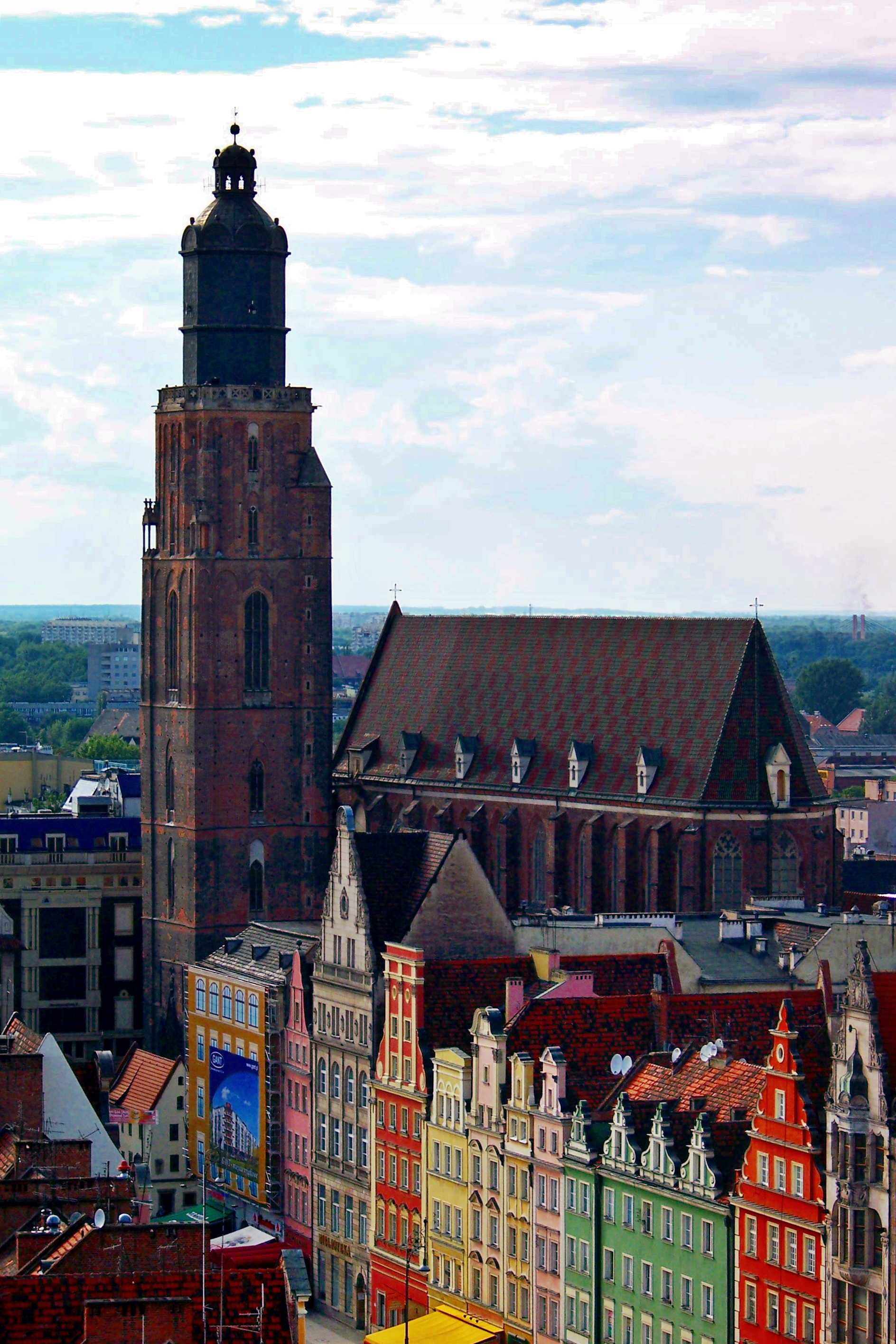 Bazylika św. Elżbiety Węgierskiej we Wrocławiu (widok z wieży Katedry św. Marii Magdaleny)